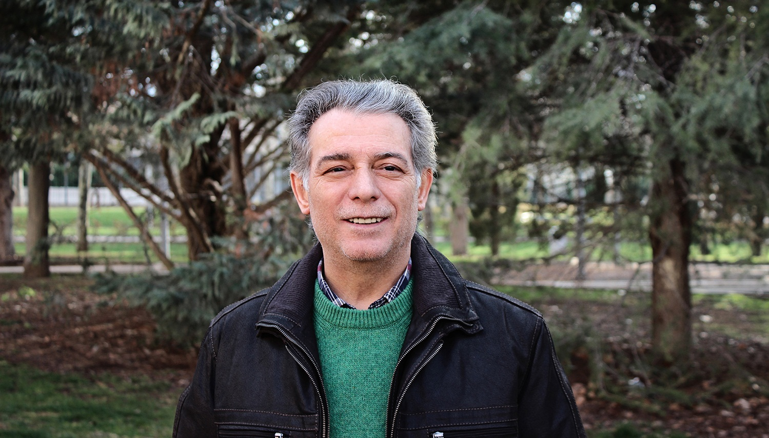 José María González Ortega. Parque de Gasset, Ciudad Real (2015).